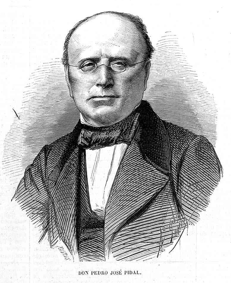 Don Pedro José Pidal, en la revista española El Museo Universal.